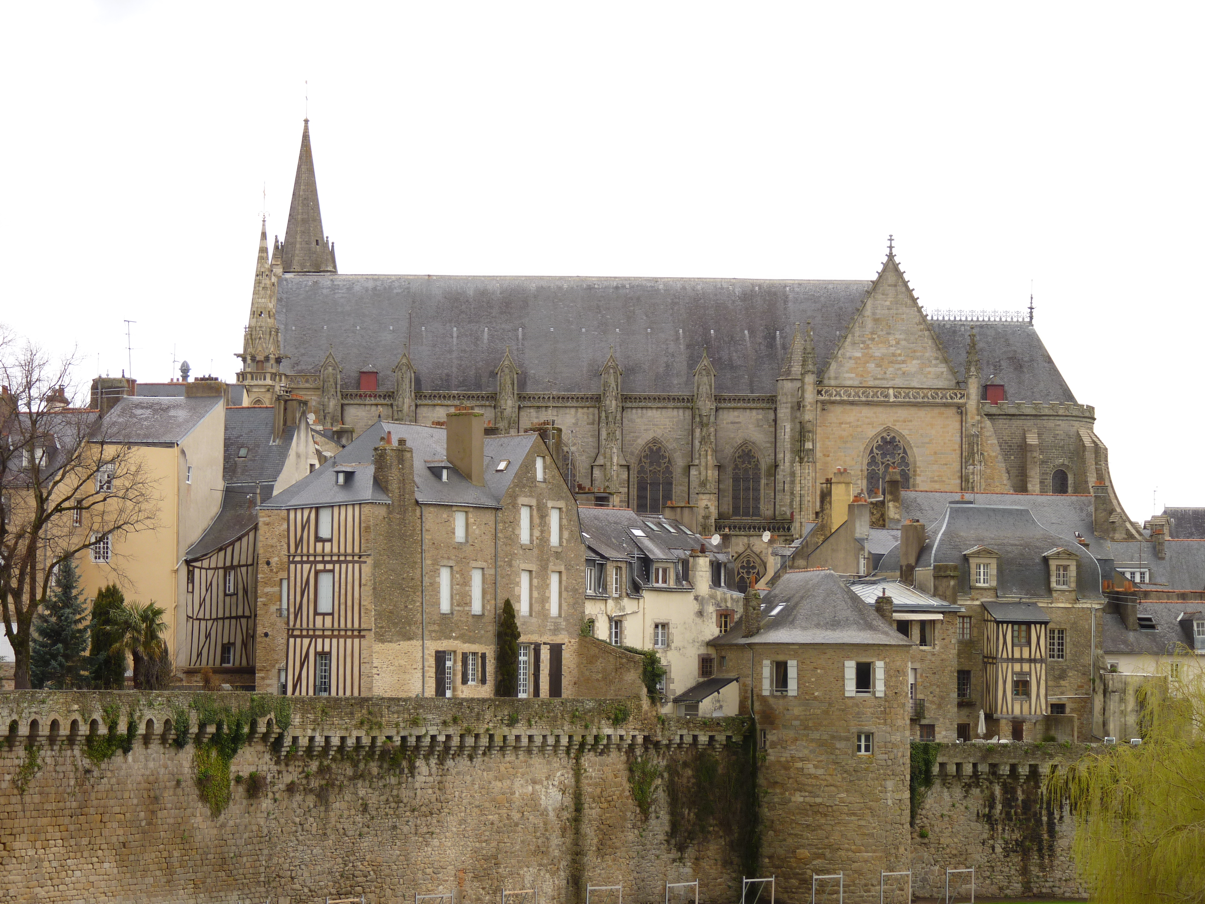 Cathédrale Saint-Pierre